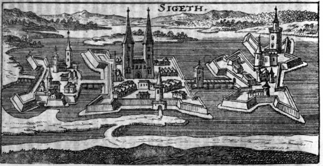 Szigetvár vára a "Das ehmals gedrückte, vonm Türken berückte, nun trefflich erquickte Königreich Hungarn." című műben, Frankfurt u. Leipzig 1688